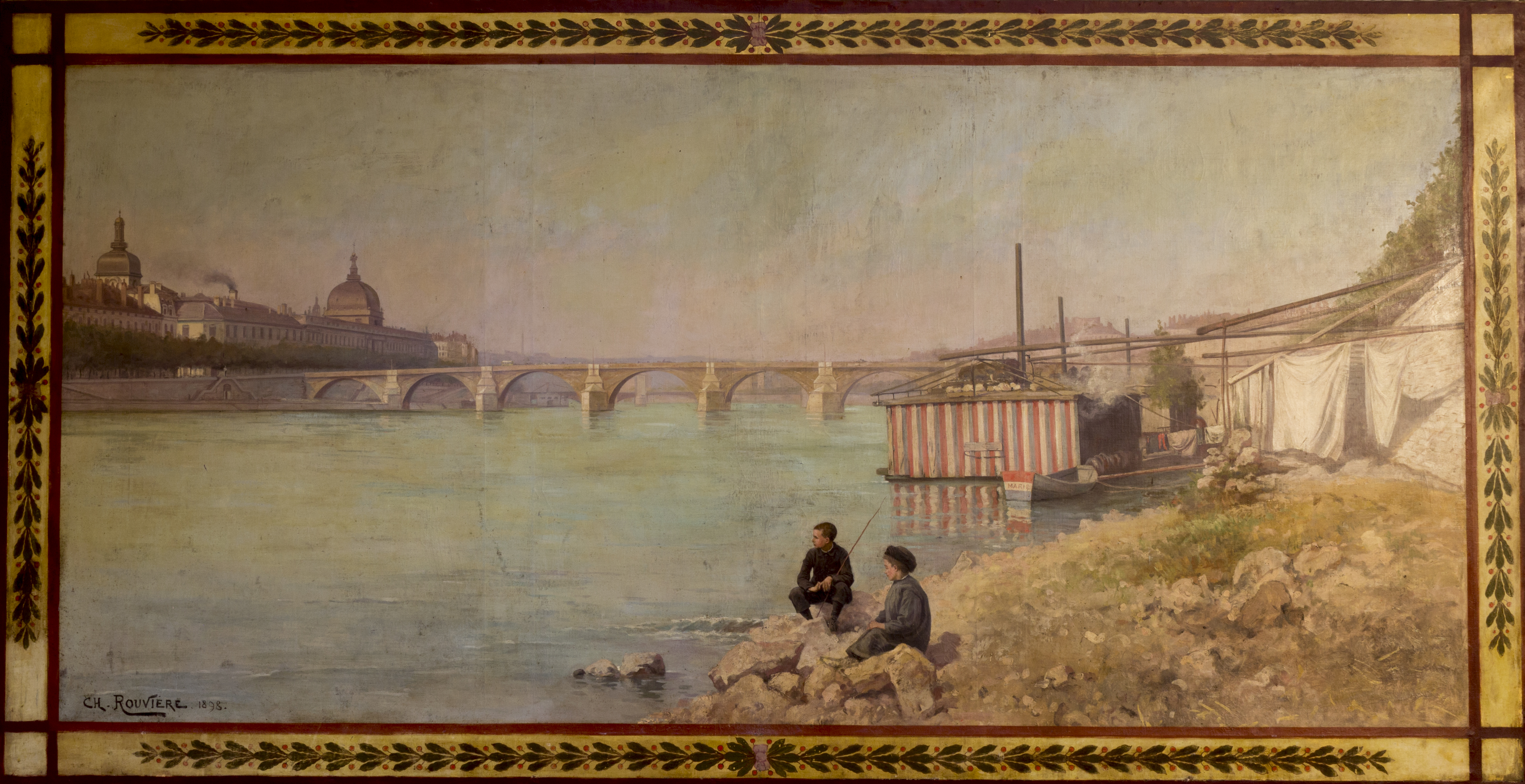 Tableau de Charles Rouvière, daté de 1878, dans l'Hôtel de préfecture du Rhône.